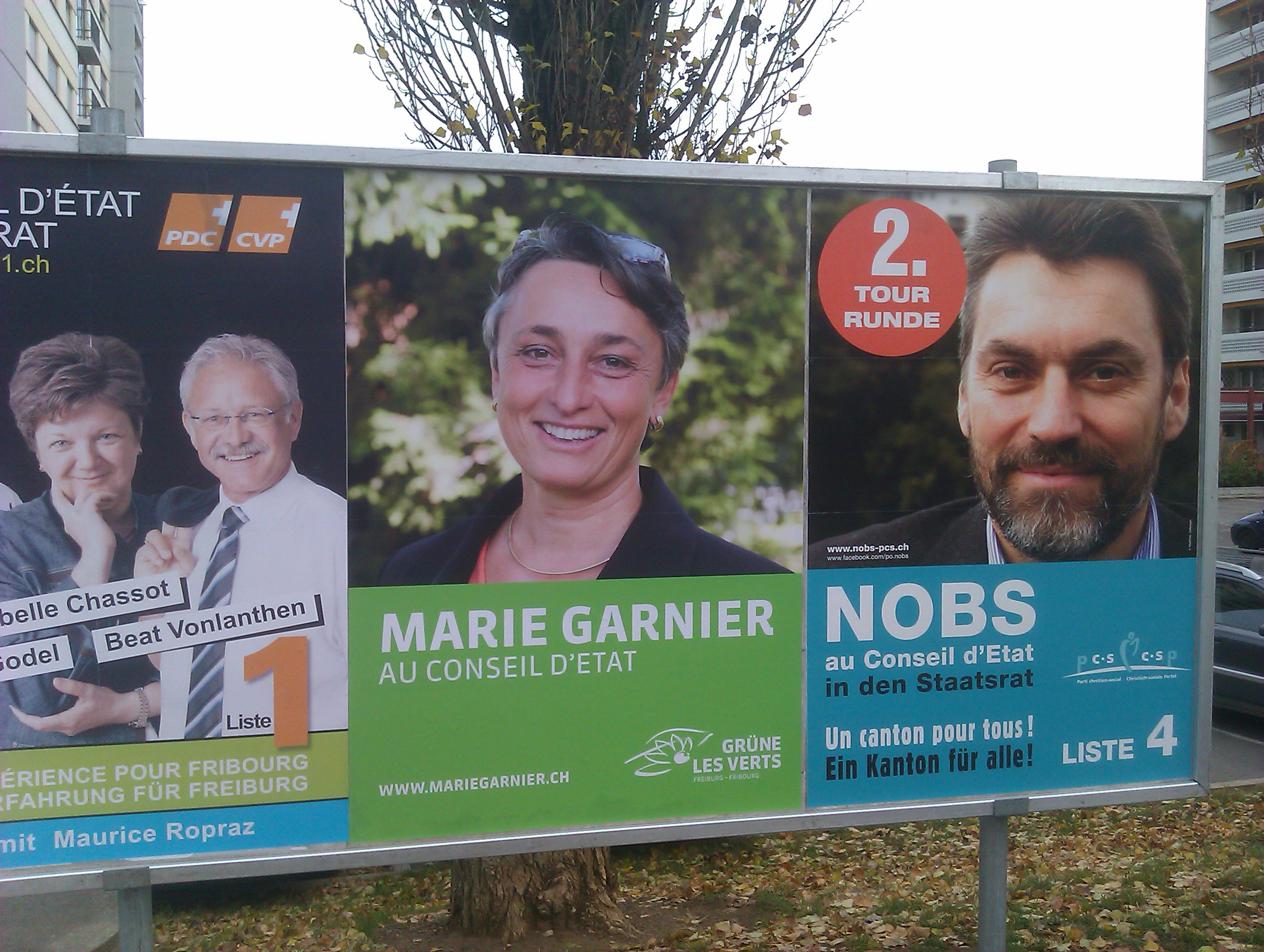 Affiches en ville de Fribourg pour le deuxième tour au Conseil d'Etat, Fribourg, 2011